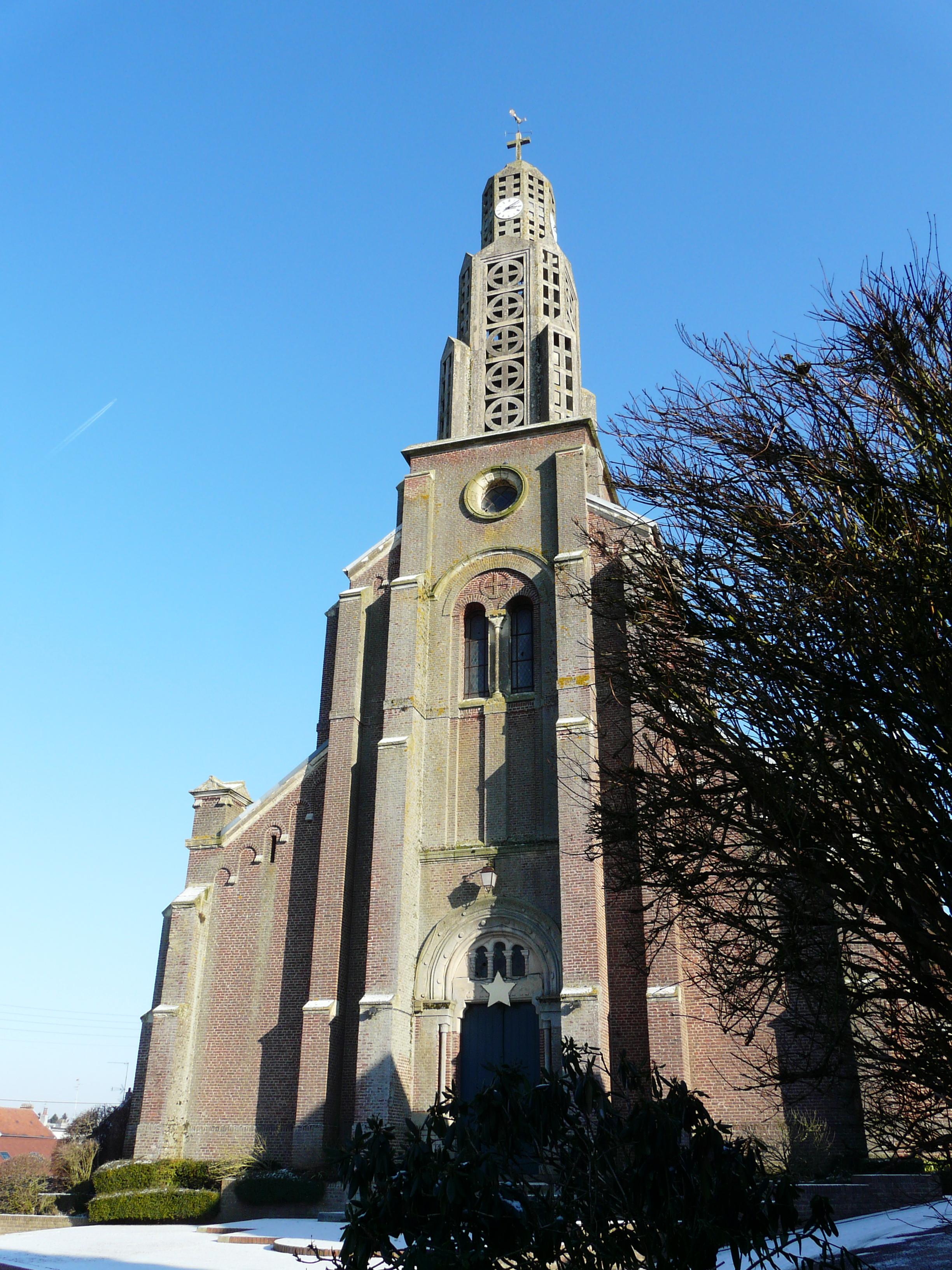 L'église Saint-Quentin de Clary (Nord)